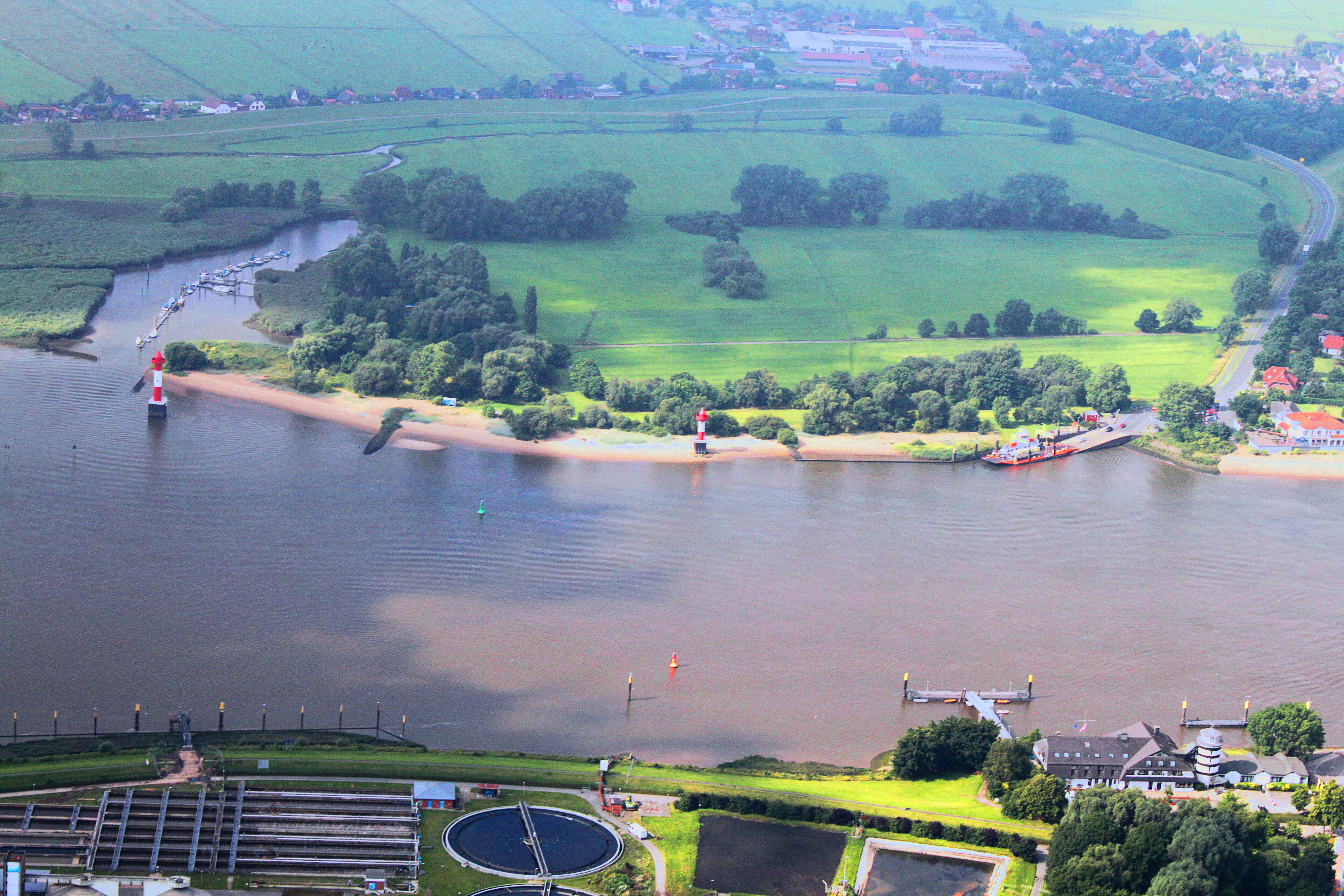 Fotoflug Bremen; Flughöhe 500 m; von der Autobahnabfahrt der A 27 in Bremen-Nord über Vegesack zum U-Boot Bunker Valentin